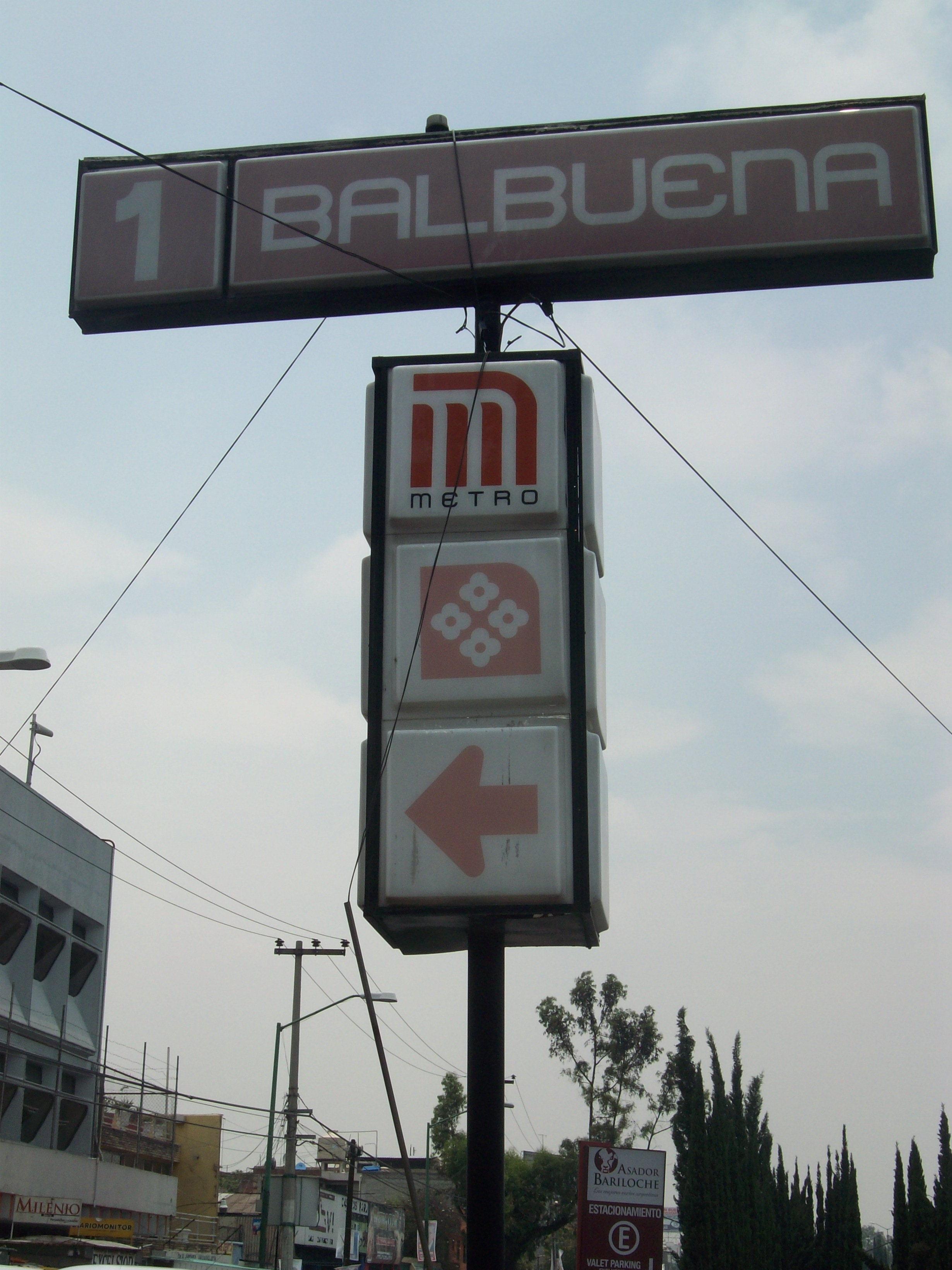 Estela estacion Balbuena